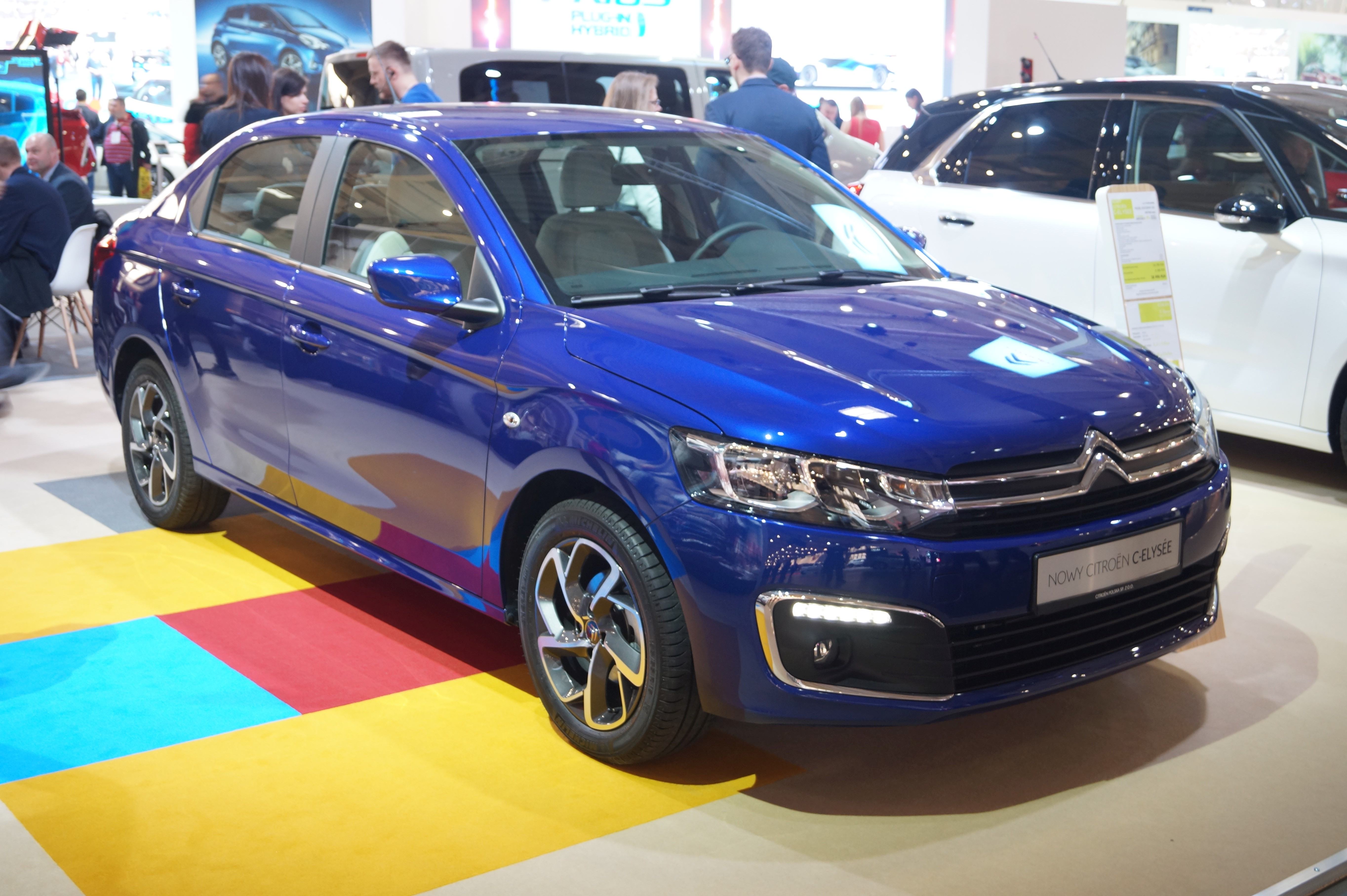 Prawy przód Citroëna C-Elysée na Motor Show Poznań 2017.